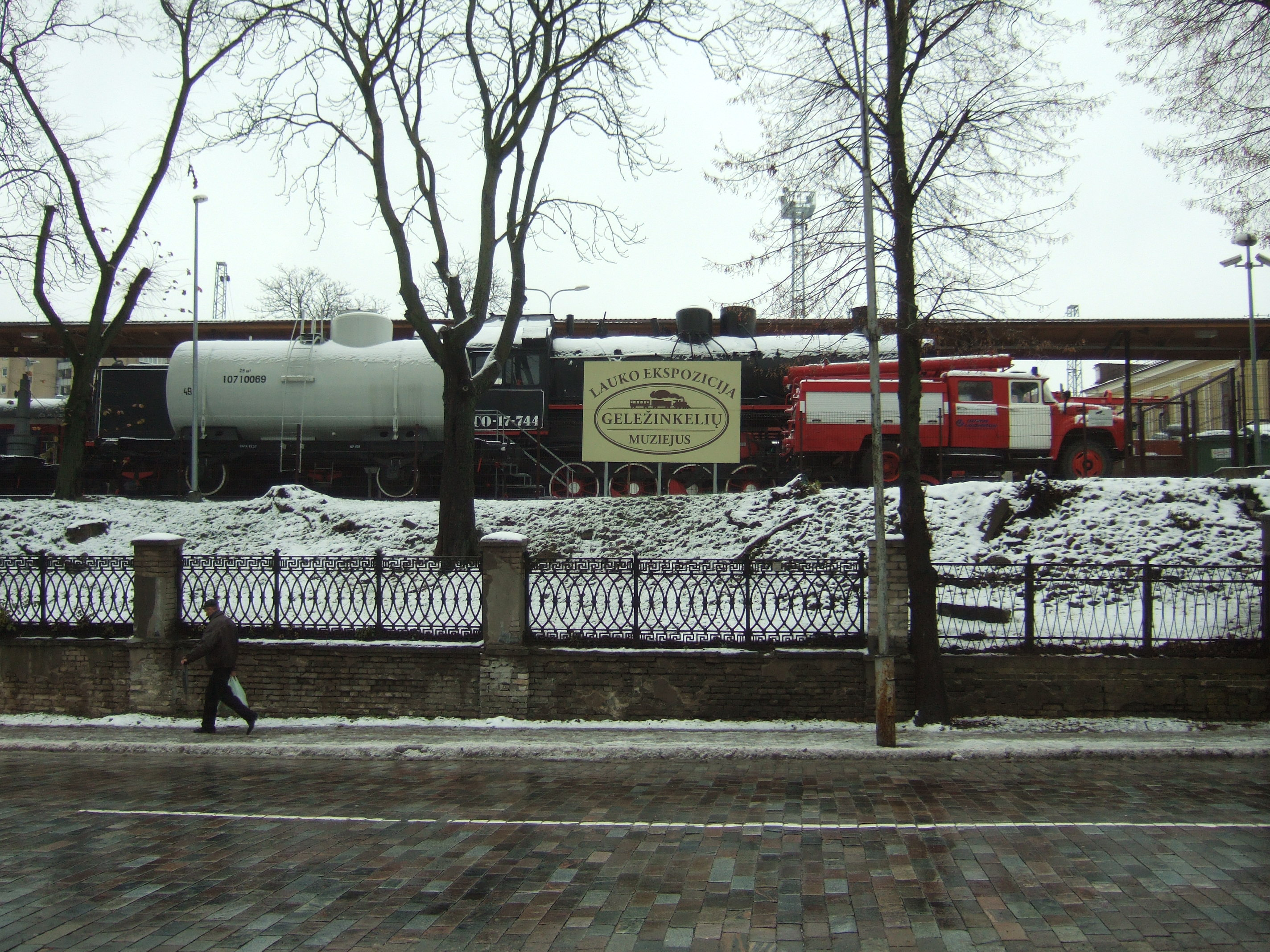 Geležinkelių muziejaus lauko ekspozicija